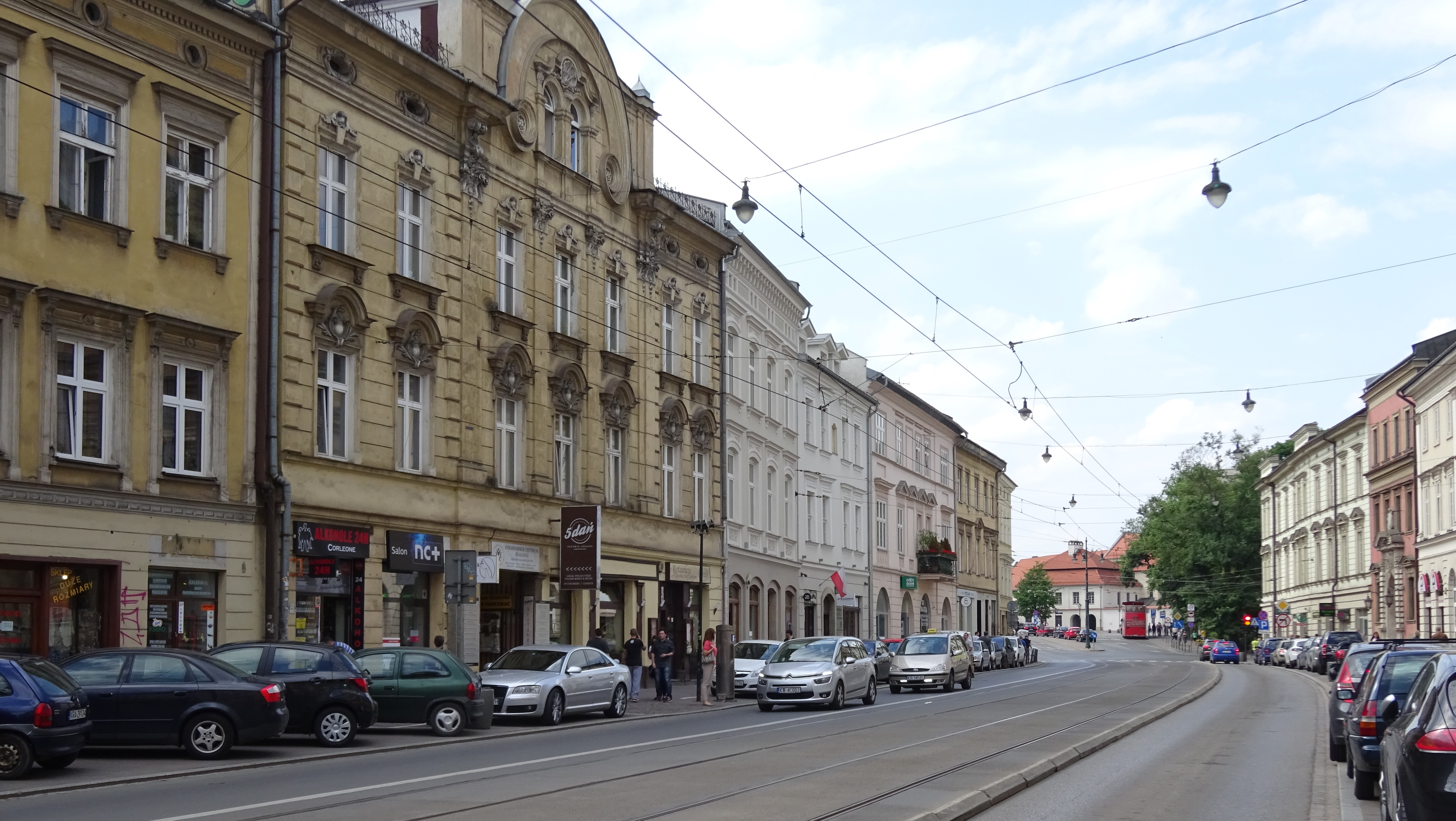 Ulica Stradomska w Krakowie. Widok na północ. 2016